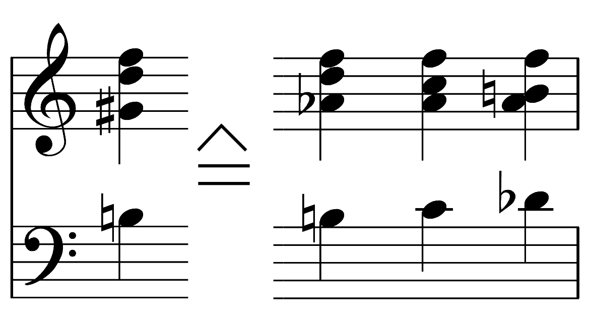 Erklärendes Notenbeispiel, selbst verfertigt.